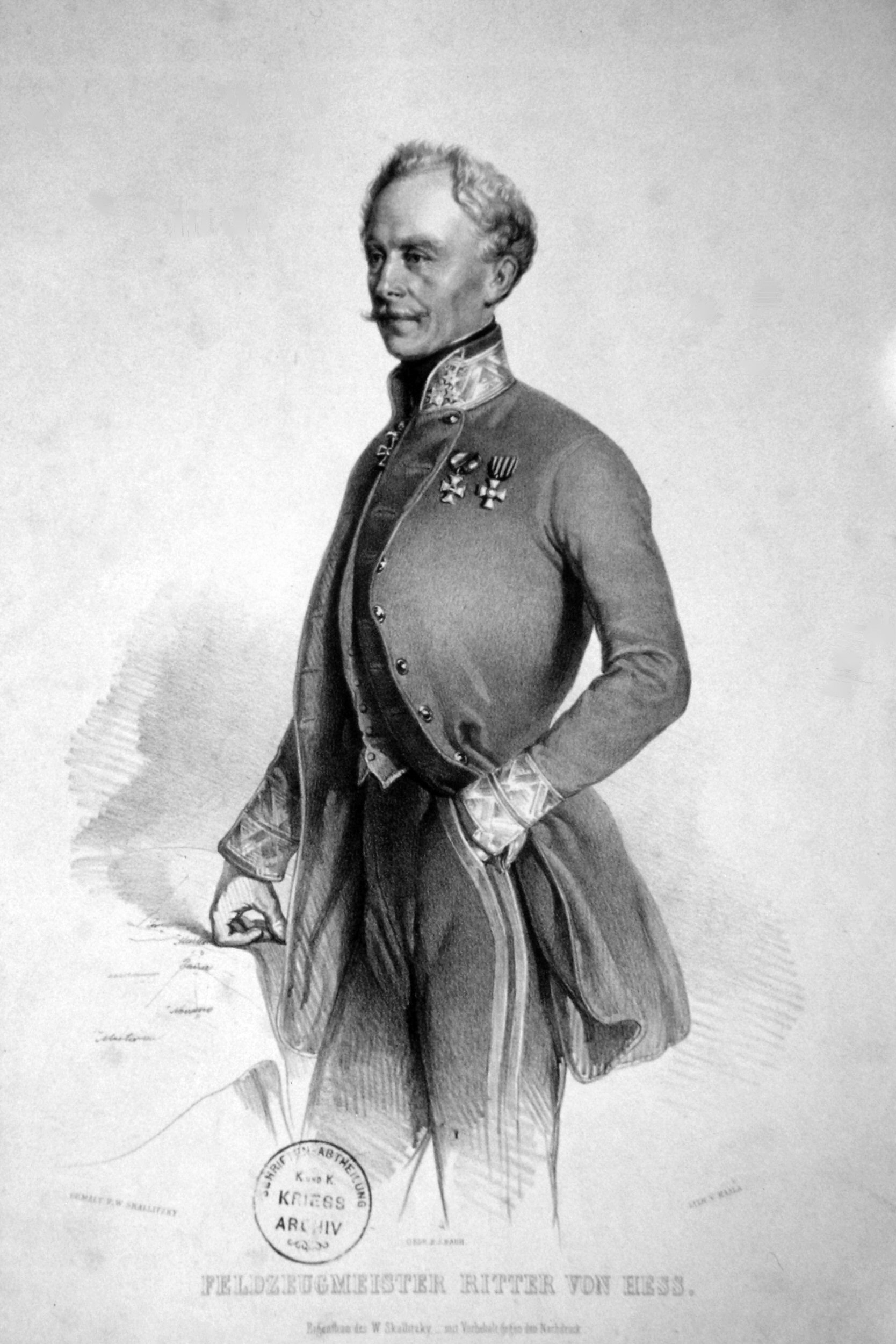 Heinrich Freiherr von Hess (1788-1870) österreichischer Feldmarschall. Lithographie von Anton Haala, um 1848, nach W. Skallitzky.